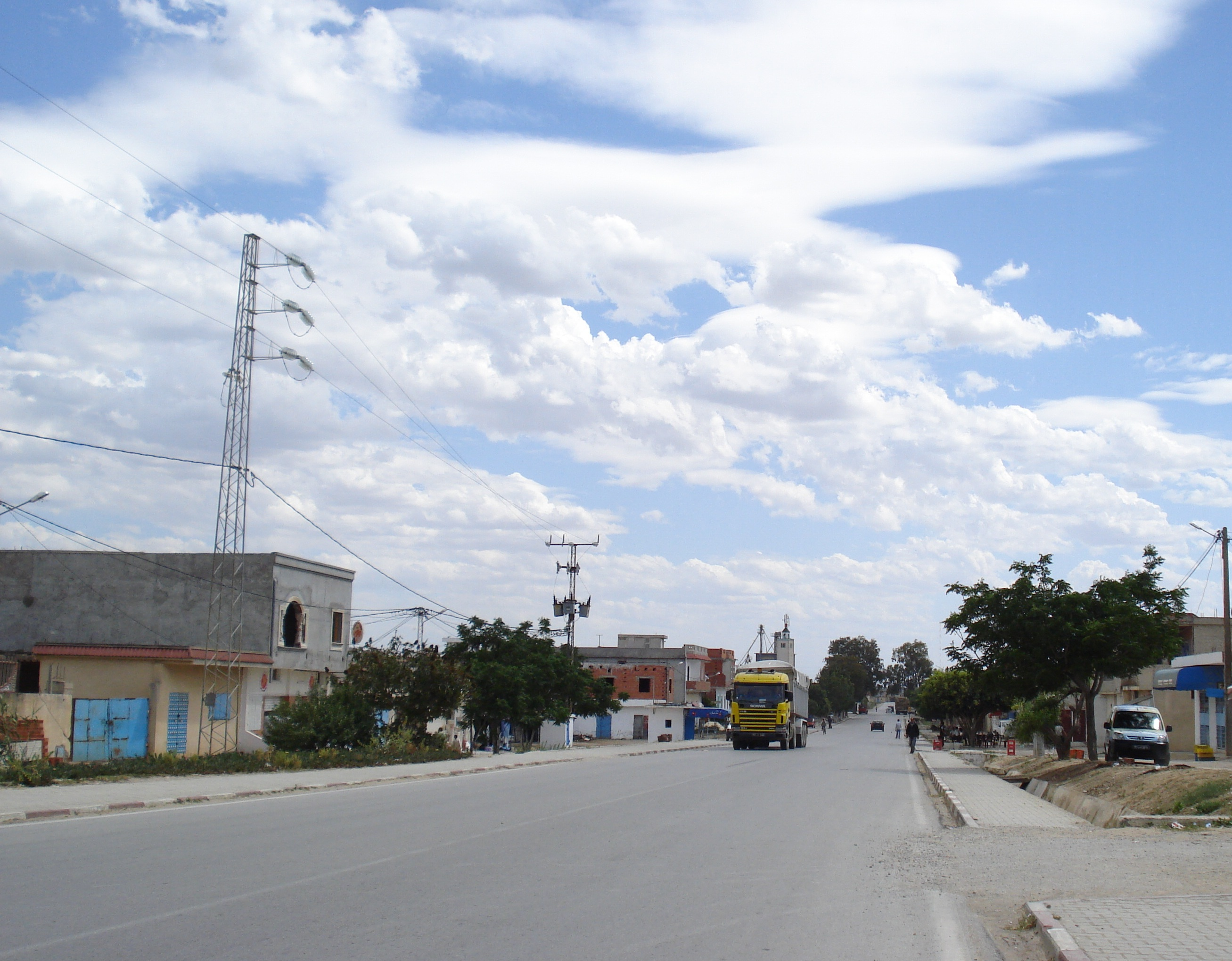 Chaouet (27 km from Tunis, near Djedaida), Tunisia